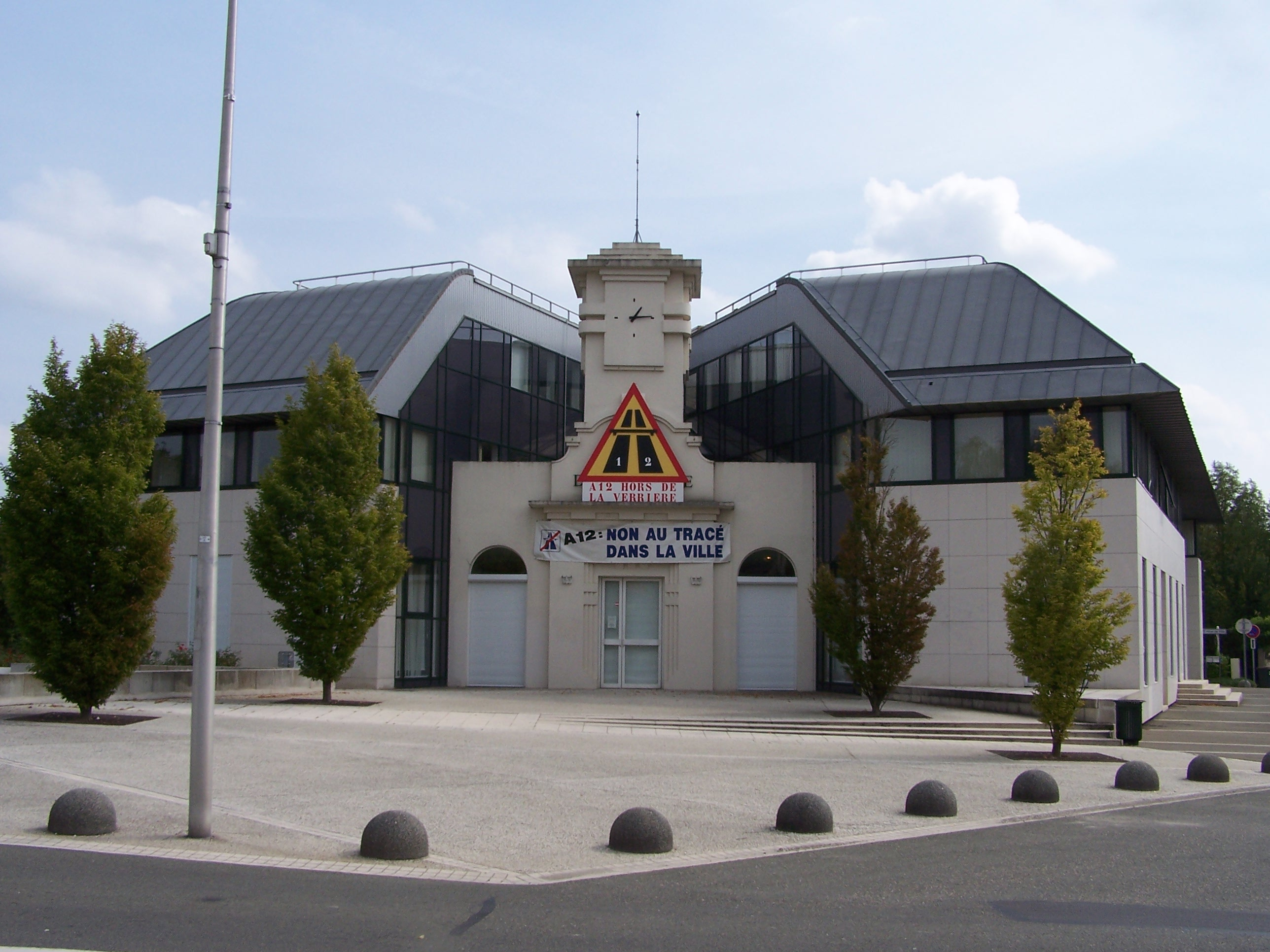 Mairie de La Verrière (Yvelines, France)